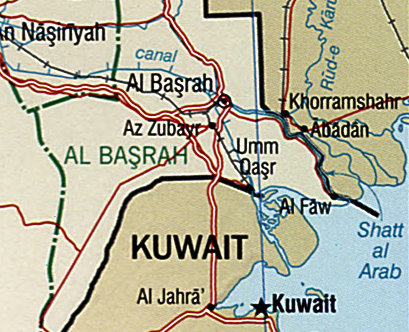 Shatt al-Arab map